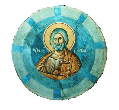 Ветхий денми. Роспись ц. Богоматери Перивлепты в Охриде. 1294 -1295 гг.